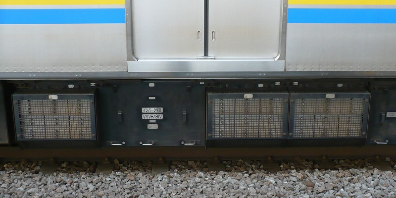 Y000系のインバータ装置